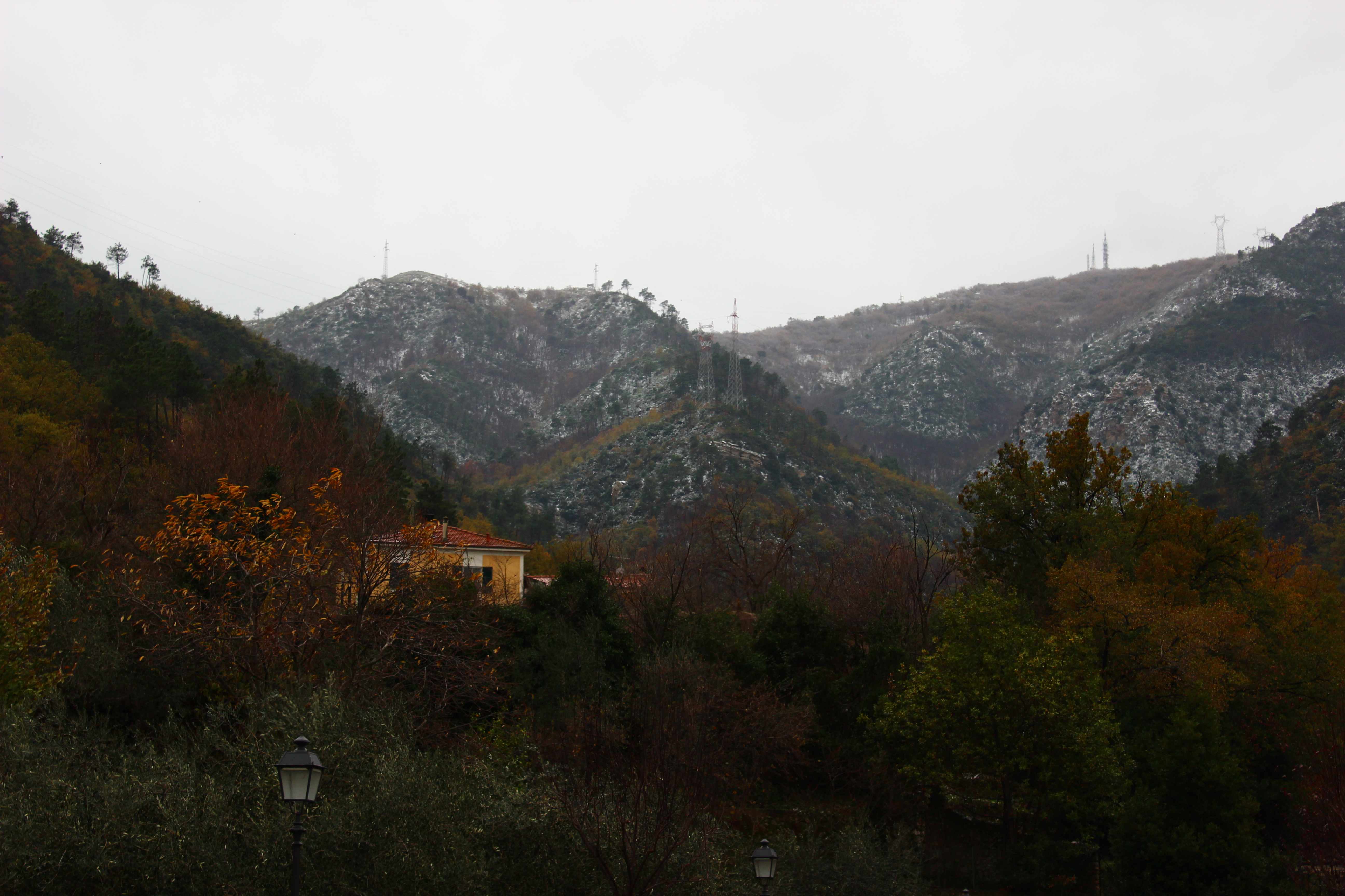 Foto delle nevicate del 14 dicembre 2012 a Lusignano di Albenga